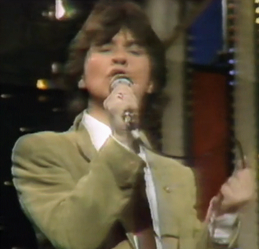 f